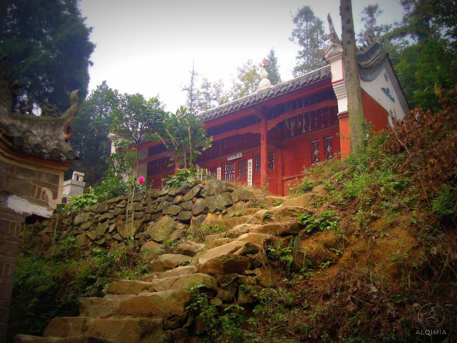 Foto do pavilhão da Guayin (deusa da compaixão) dentro do Templo dos Cinco Imortais. Tirada em 2009 por ocasião do programa de estudo nas artes daoistas ali realizado.